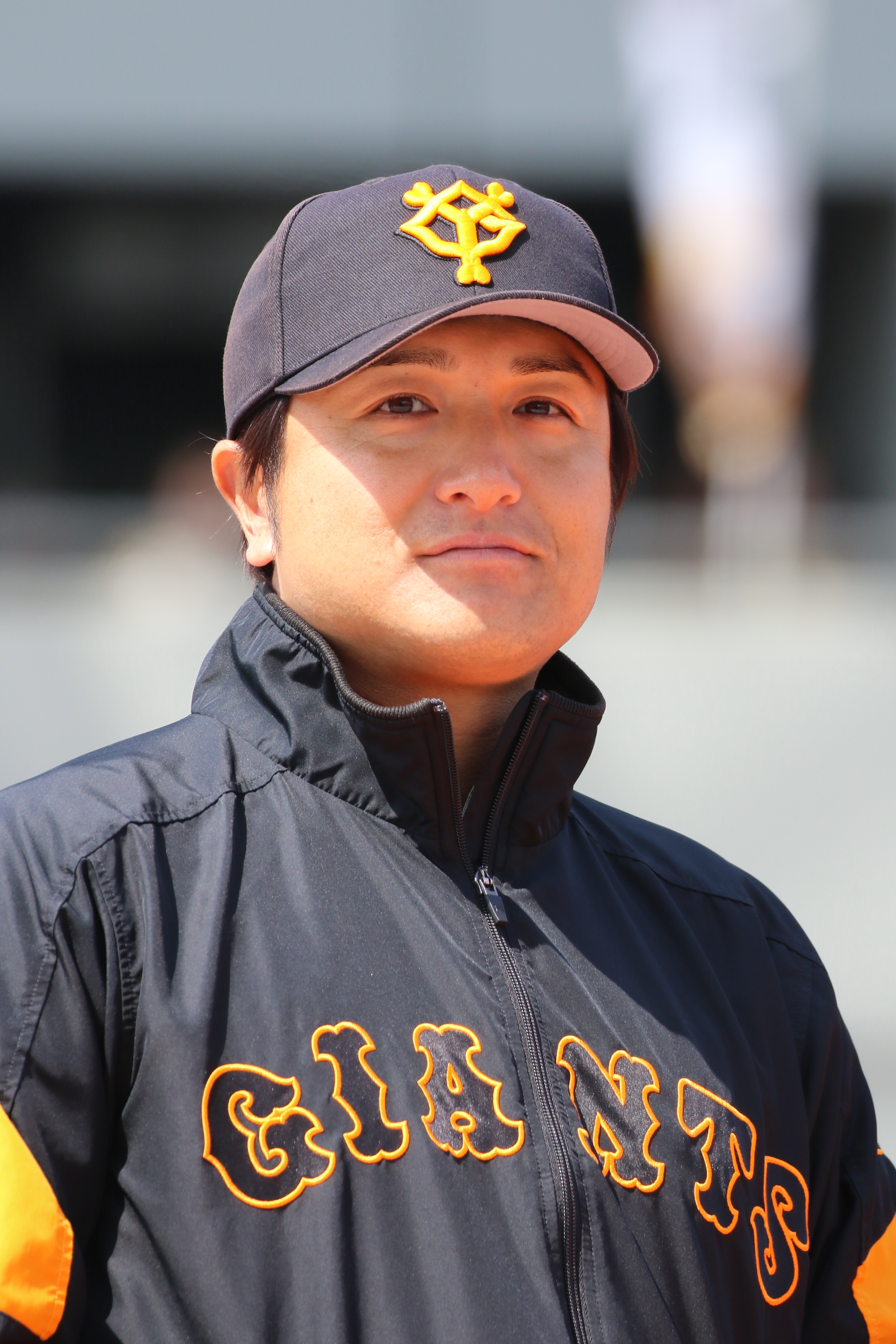 高橋由伸監督